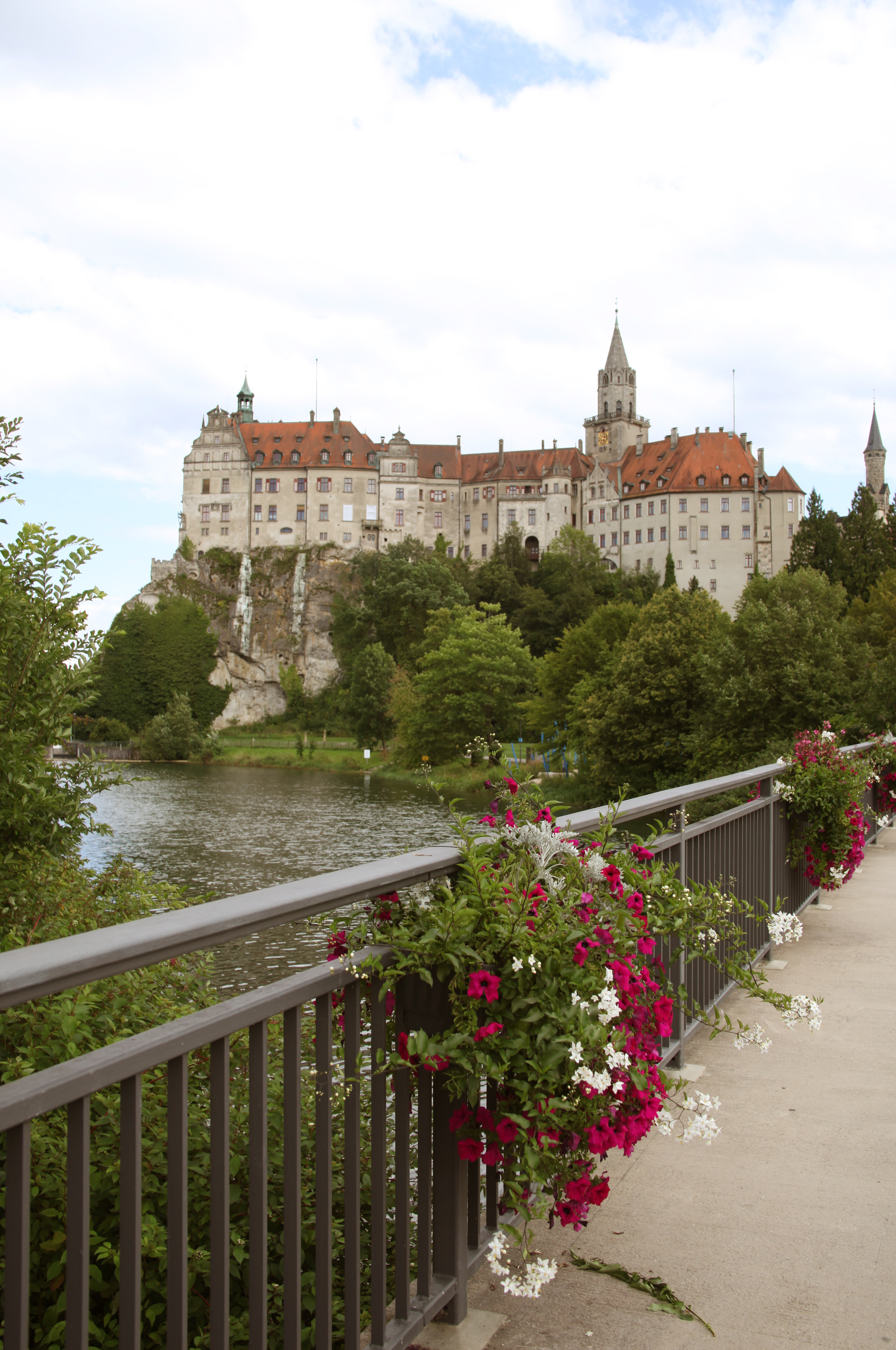 Schloss Sigmaringen